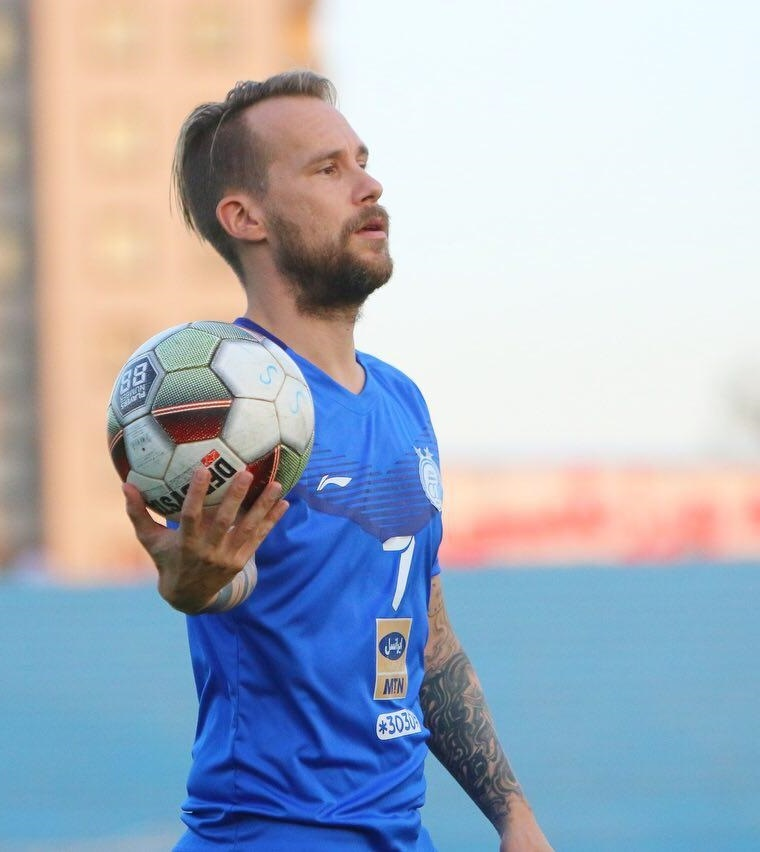 گزارش تصویری از تمرین تیم فوتبال استقلال در مهر ۱۳۹۷